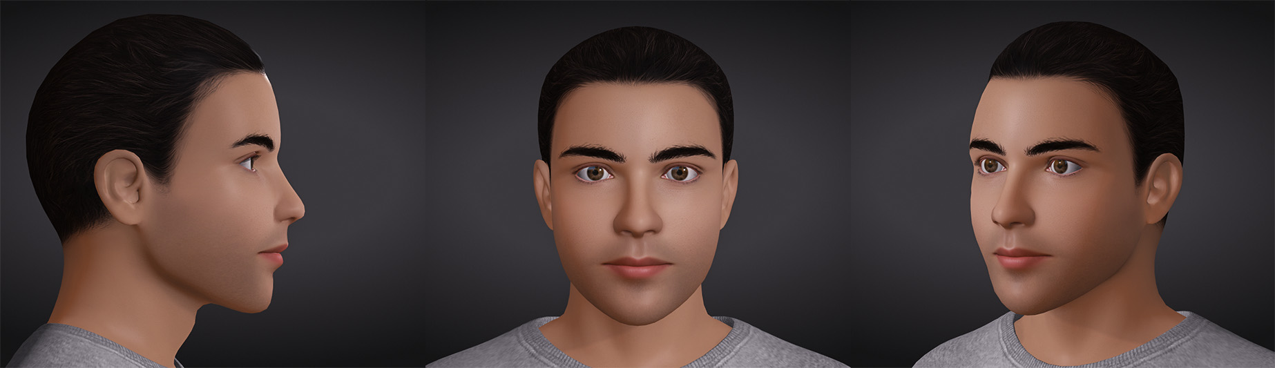 3D модель положення голови 3D head position model